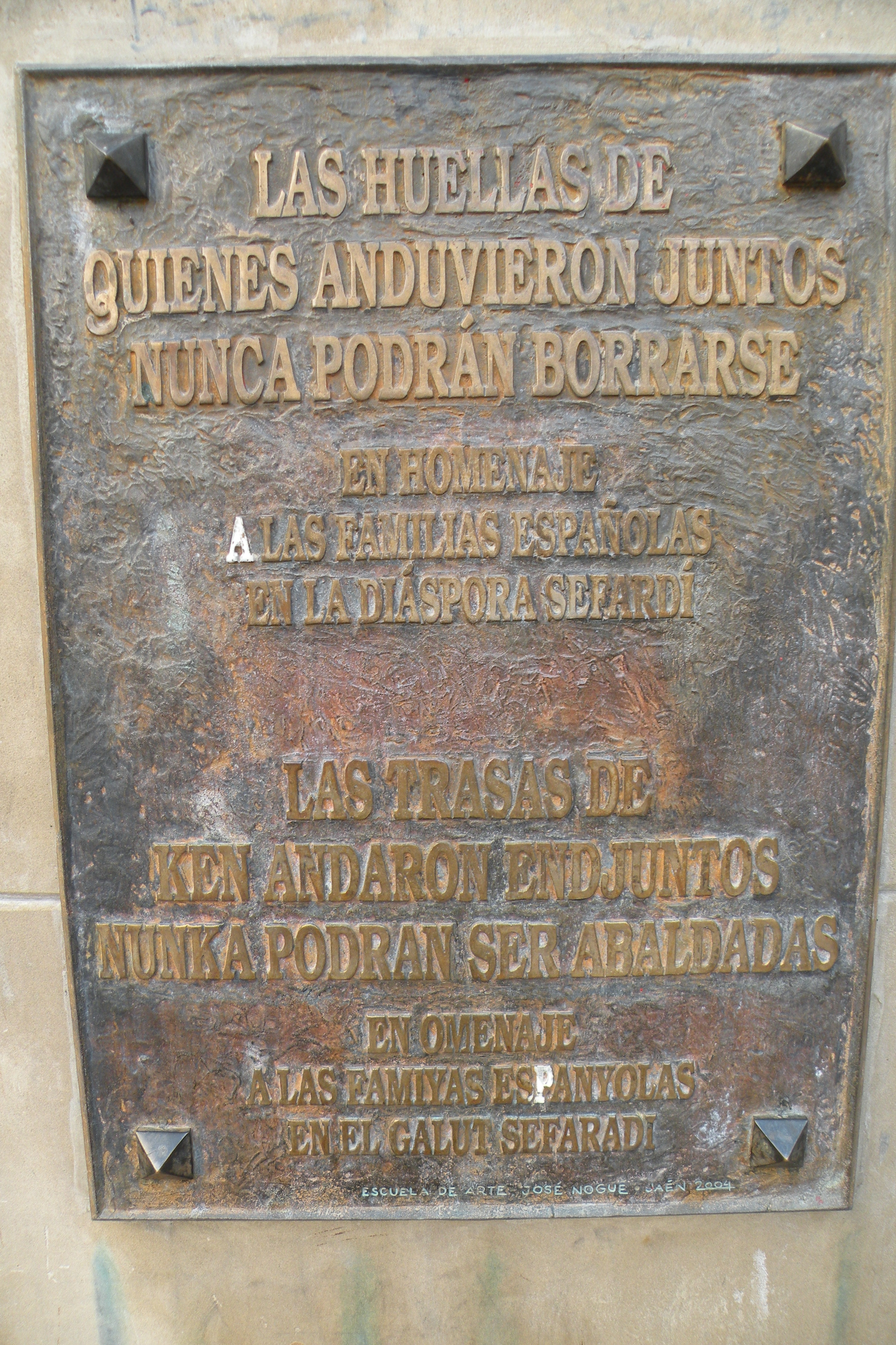 texto en castellano y sefardí.